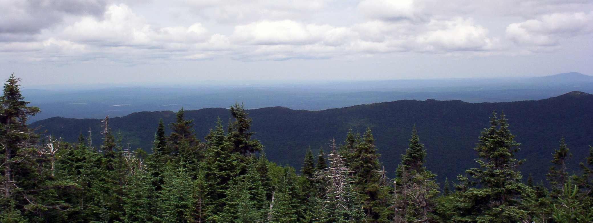 Montagnes de Franceville vues du Mont Mégantic